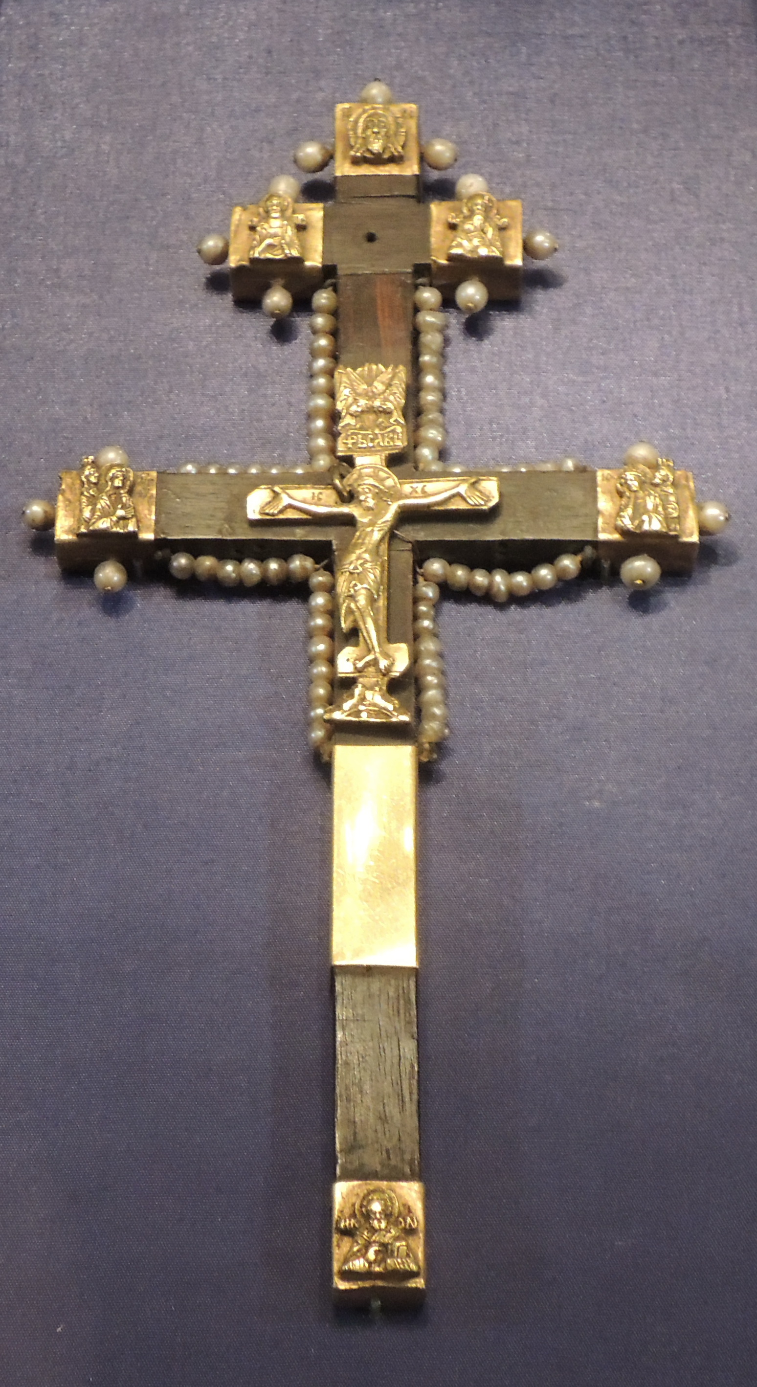 Крест-мощевик. Москва, мастерские Кремля, начало 16 века. Дерево, золото, серебро, жемчуг, литье, резьба. ММК. Согласно Описи Благовещенского собора 1680 года, крест, дерево которого отождествлялось с Древом Истинного Креста, был центральной святыней серебряного киота-мощевика, по устройству подобного древним византийским ставротекам. Вокруг крест помещались мощи святых в 45 "местах".